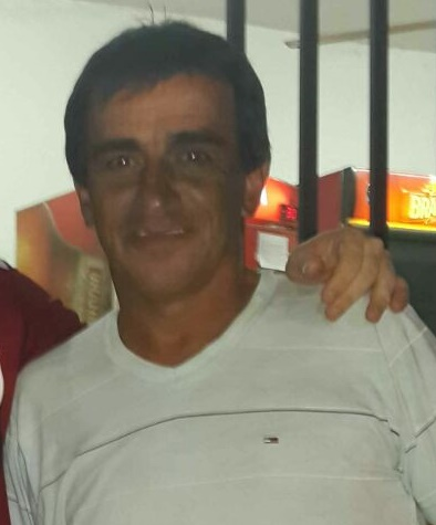 Virginio Cáceres Villalba, ex futbolista paraguayo que jugó de defensa lateral derecho entre 1984 y 2002 en Guaraní, Olimpia y la selección paraguaya. Foto tomada en 2015.